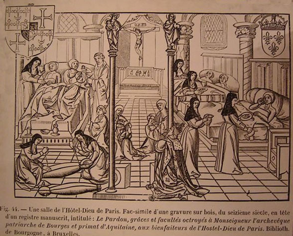 Gravure représentant la vie quotidienne à l'Hôtel-Dieu au XVIe siècle Exposition au musée de l'Assistance publique de Paris